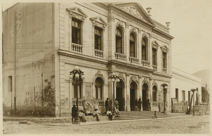 LUGAR DE ORIGENPachuca, Hidalgo, México FECHA DE CREACIÓNCa. 1916 TIPO DE RECURSO Imagen fija Fotografía DESCRIPCIÓN FÍSICA FORMARayadurasDobladurasRaspadurasManchasRoturaHasta 28.0 - 35.6 cms (11 - 14 pulgadas)Impresión plata sobre gelatina (entonada y manipulada) UBICACIÓN Fototeca Nacional OBJETOS RELACIONADOS Estado de Hidalgo Arquitectura